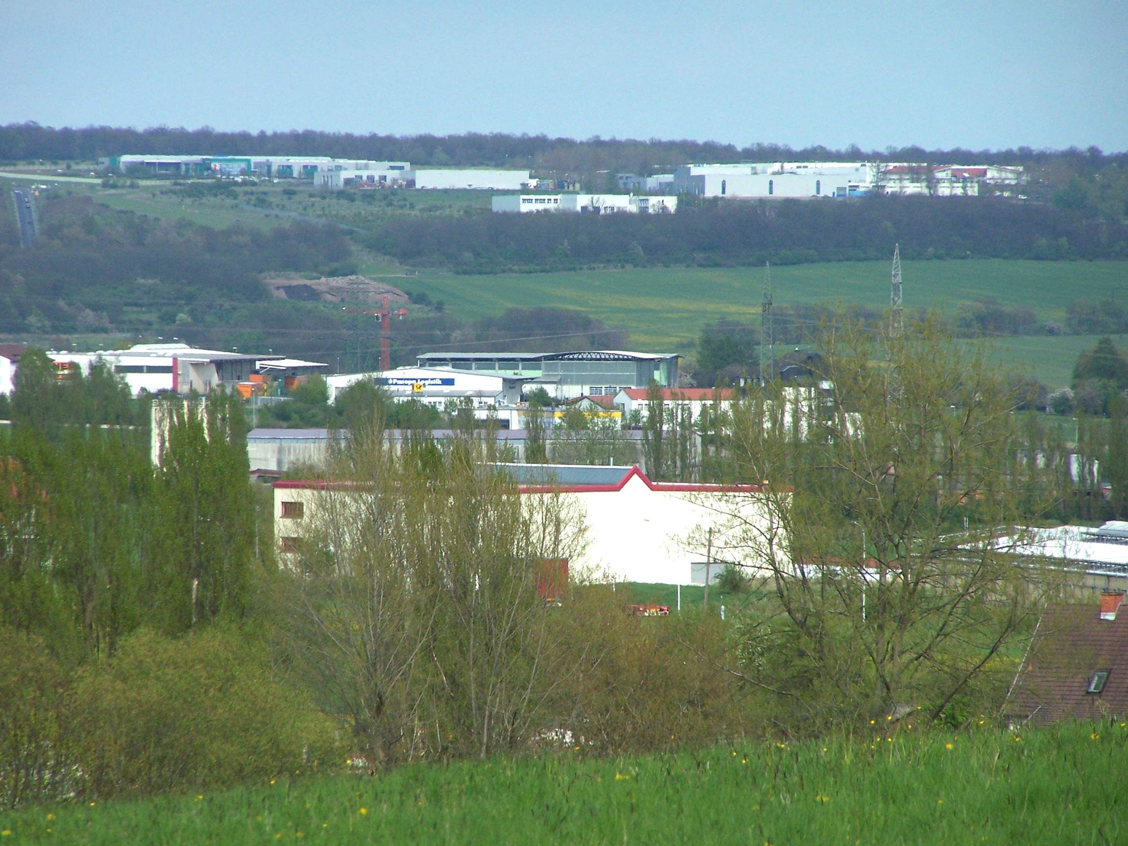 Wenigenlupnitz, Industriegebiet Kindel